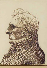 Marie-Barthélémy, vicomte de Castelbajac